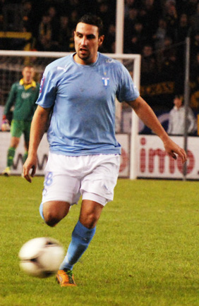 Alexander Nilsson